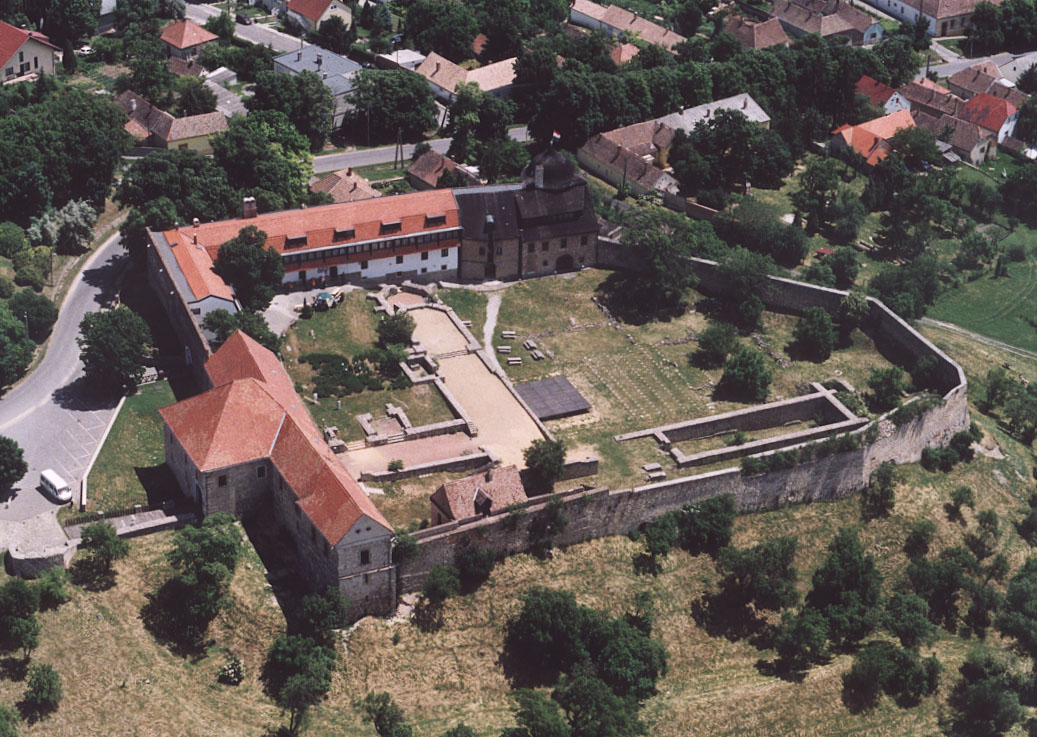 Bencés apátság - Pécsvárad - Hungary - Europe